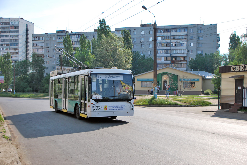 Низкопольный троллейбус "Тролза Мегаполис" в Воронеже